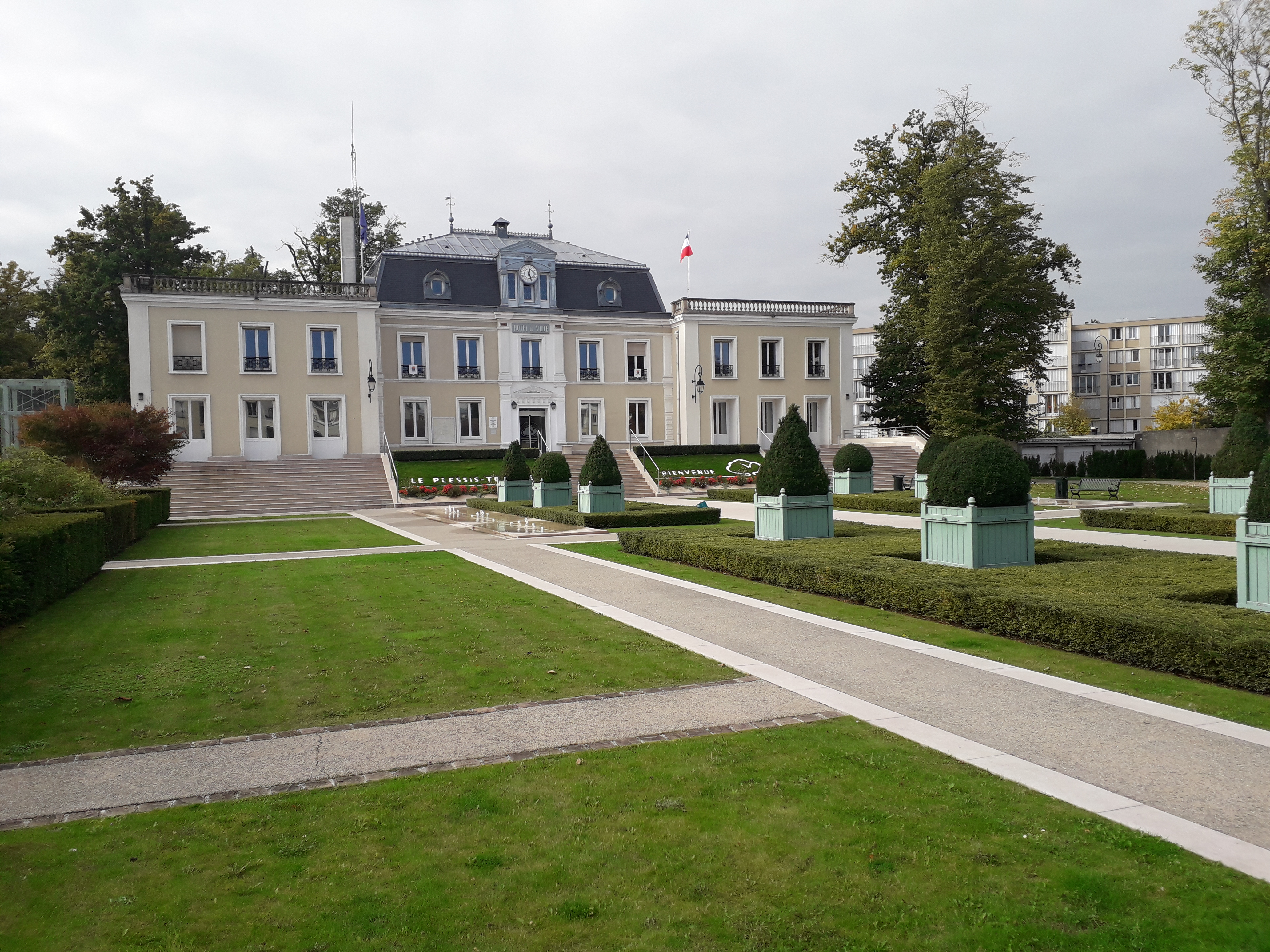 Vue de trois quarts de face de la mairie du Plessis-Trévise, dans le Val-de-Marne, en France, en octobre 2017.